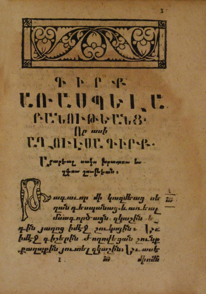 Страница первого издания «Лисьей книги», 1668, Амстердам